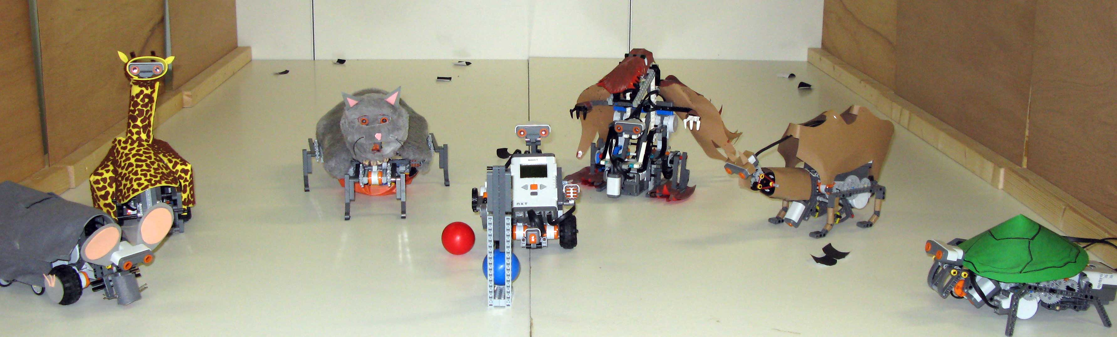 Cdays Zoo